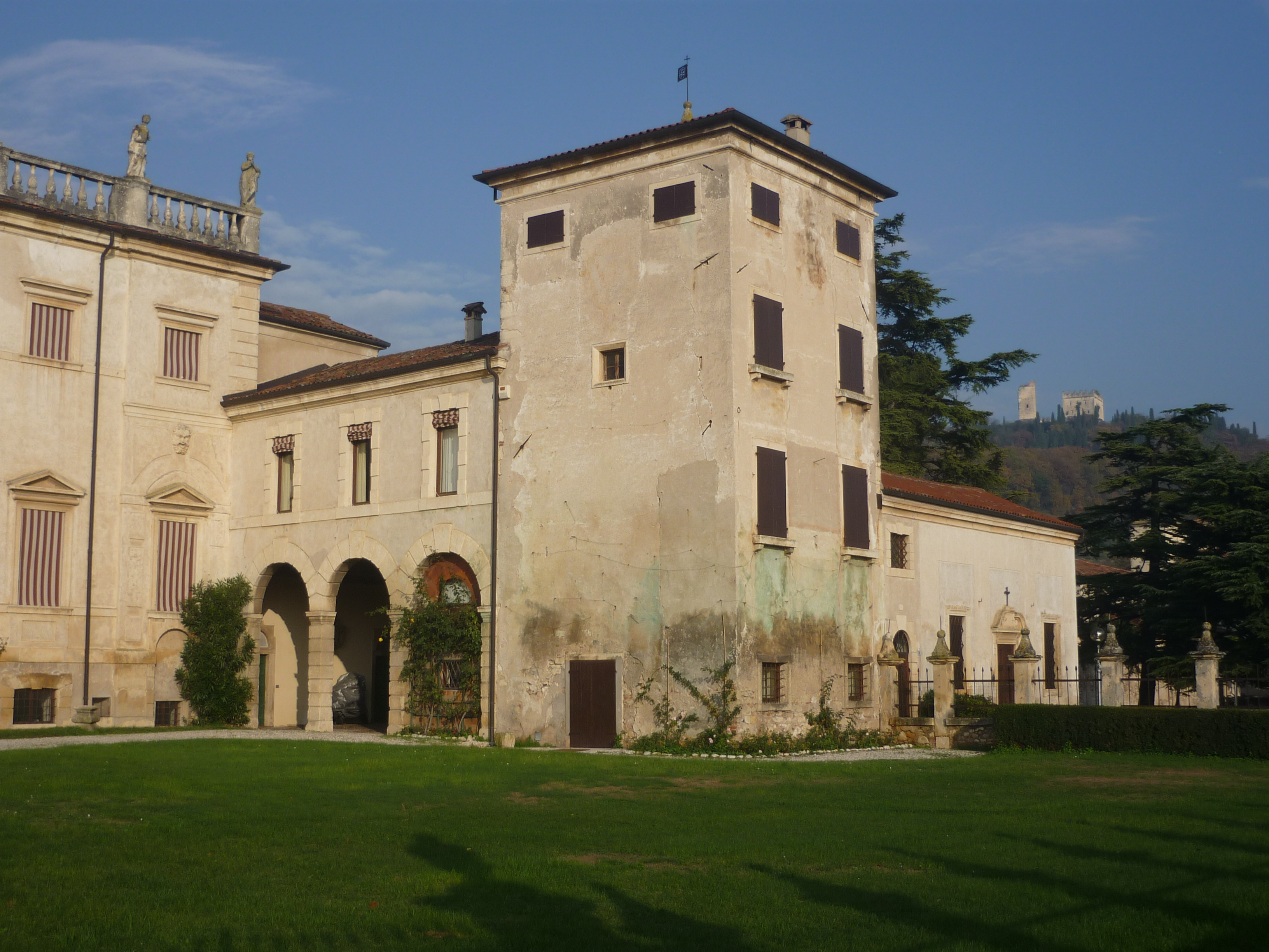 Ala ovest della villa Pompei-Carlotti di Illasi (Verona, Italy)